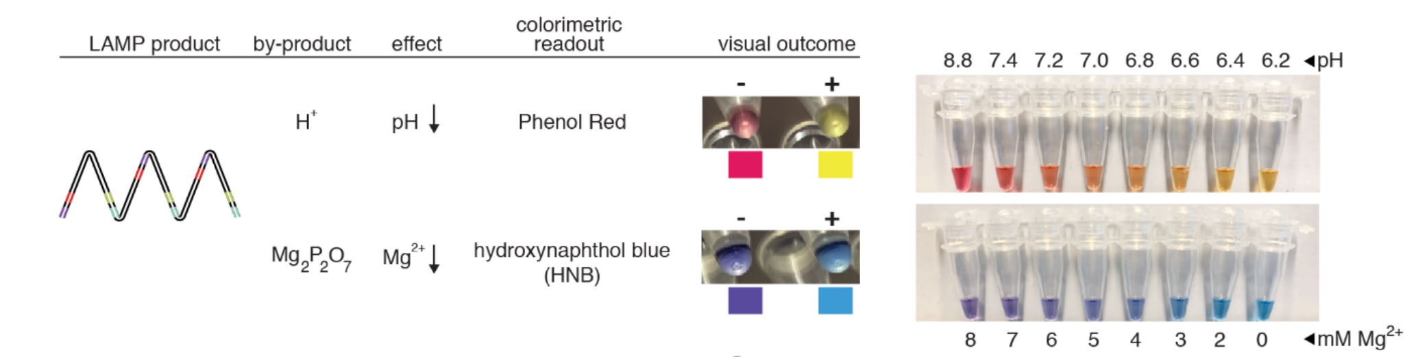 Colorimetric outputs of a LAMP reaction, based on either pH or magnesium.